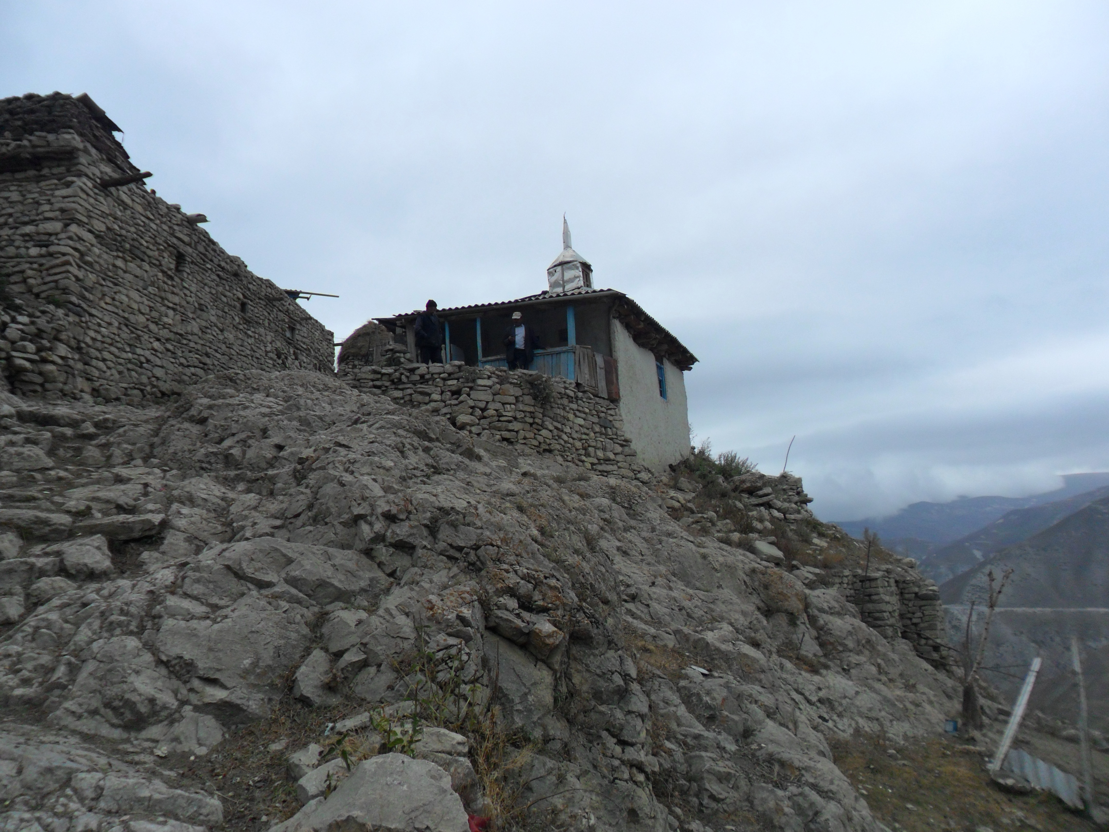 Əbu Müslim məscidi (Cek)